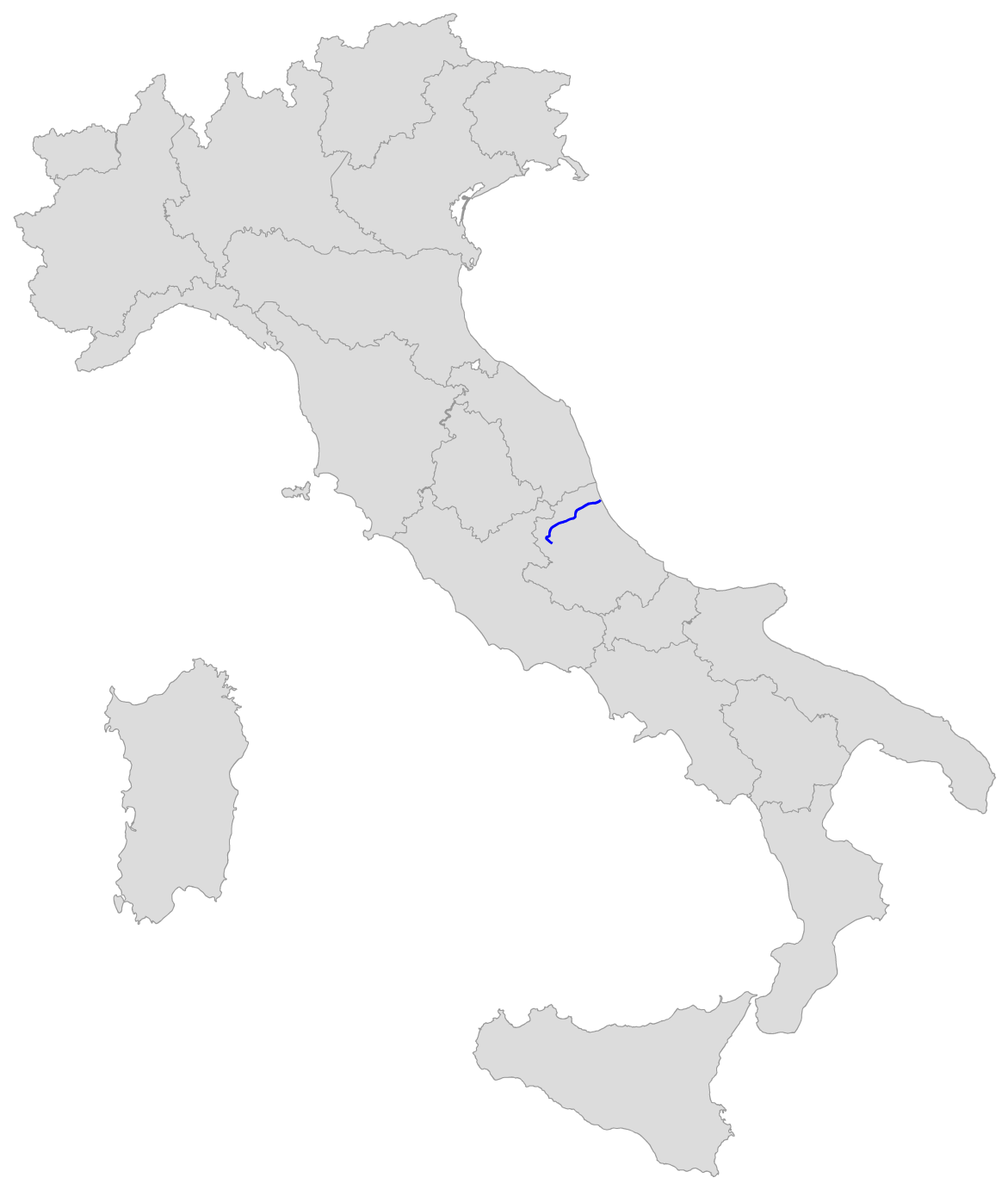 Percorso della SS 80 del Gran Sasso d'Italia